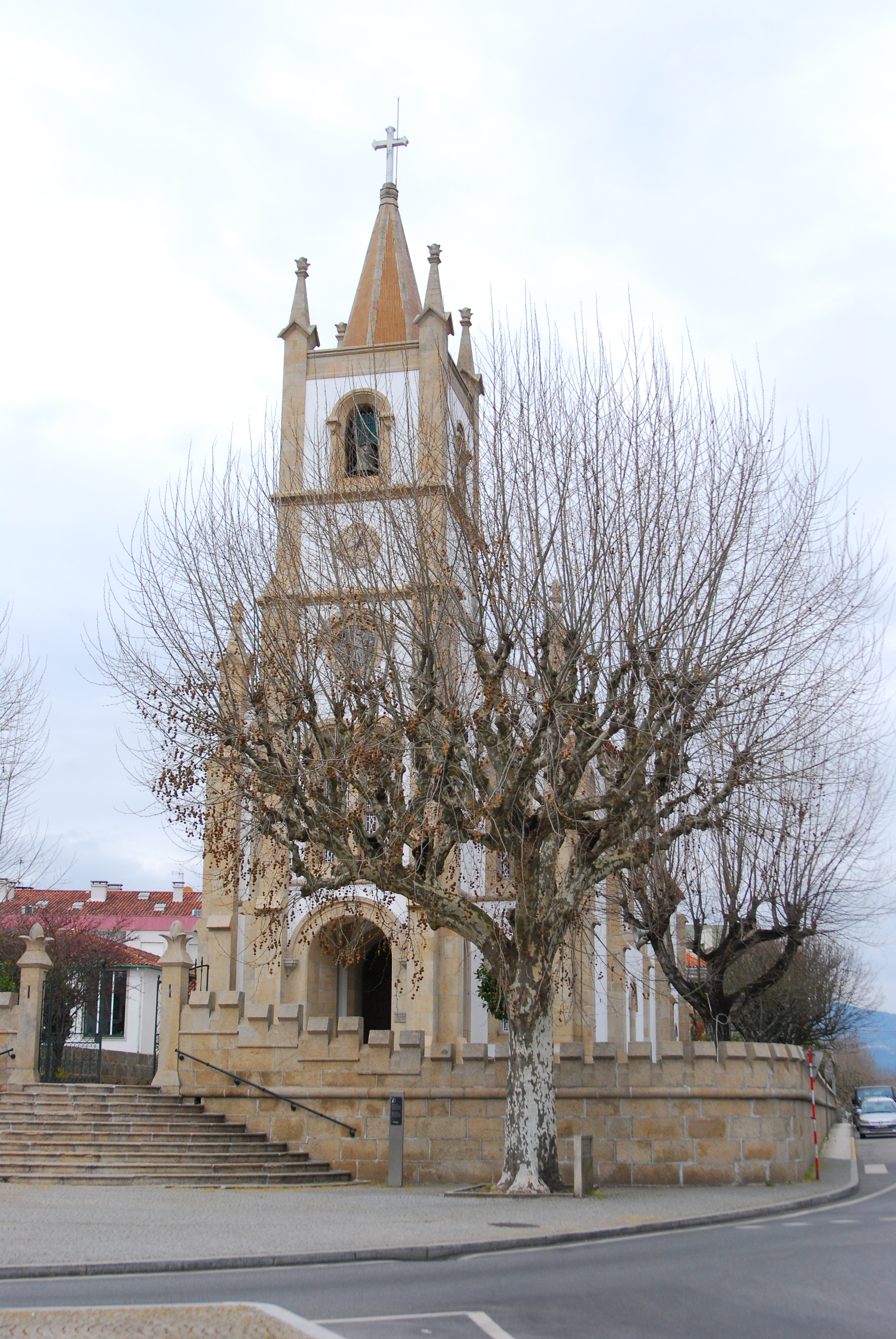 Kirche in Tondela, Portugal